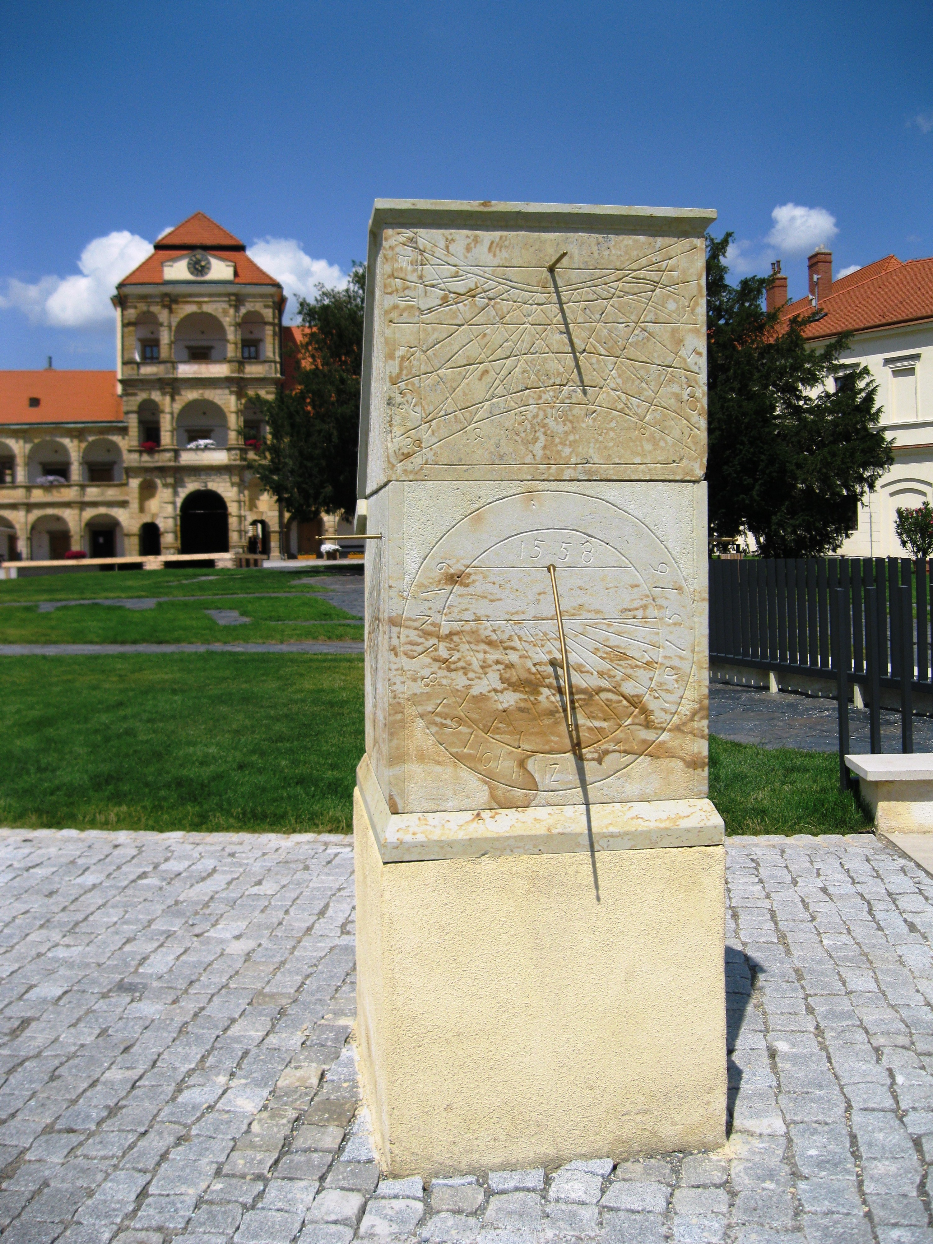 Hodiny sluneční pilířové (Moravská Třebová), nádvoří zámku, Moravská Třebová